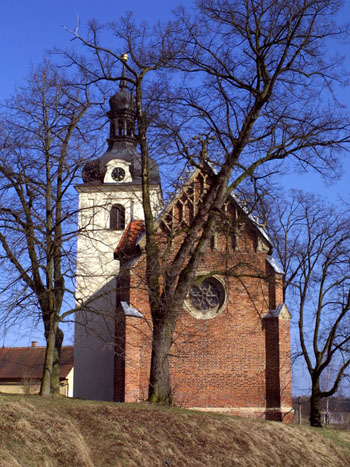 Kostel sv. Mikuláše v Čečovicích postavený jako farní, cihlový gotický kostel před koncem 14. století.